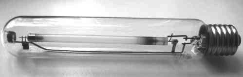 Eigen foto van de lamp